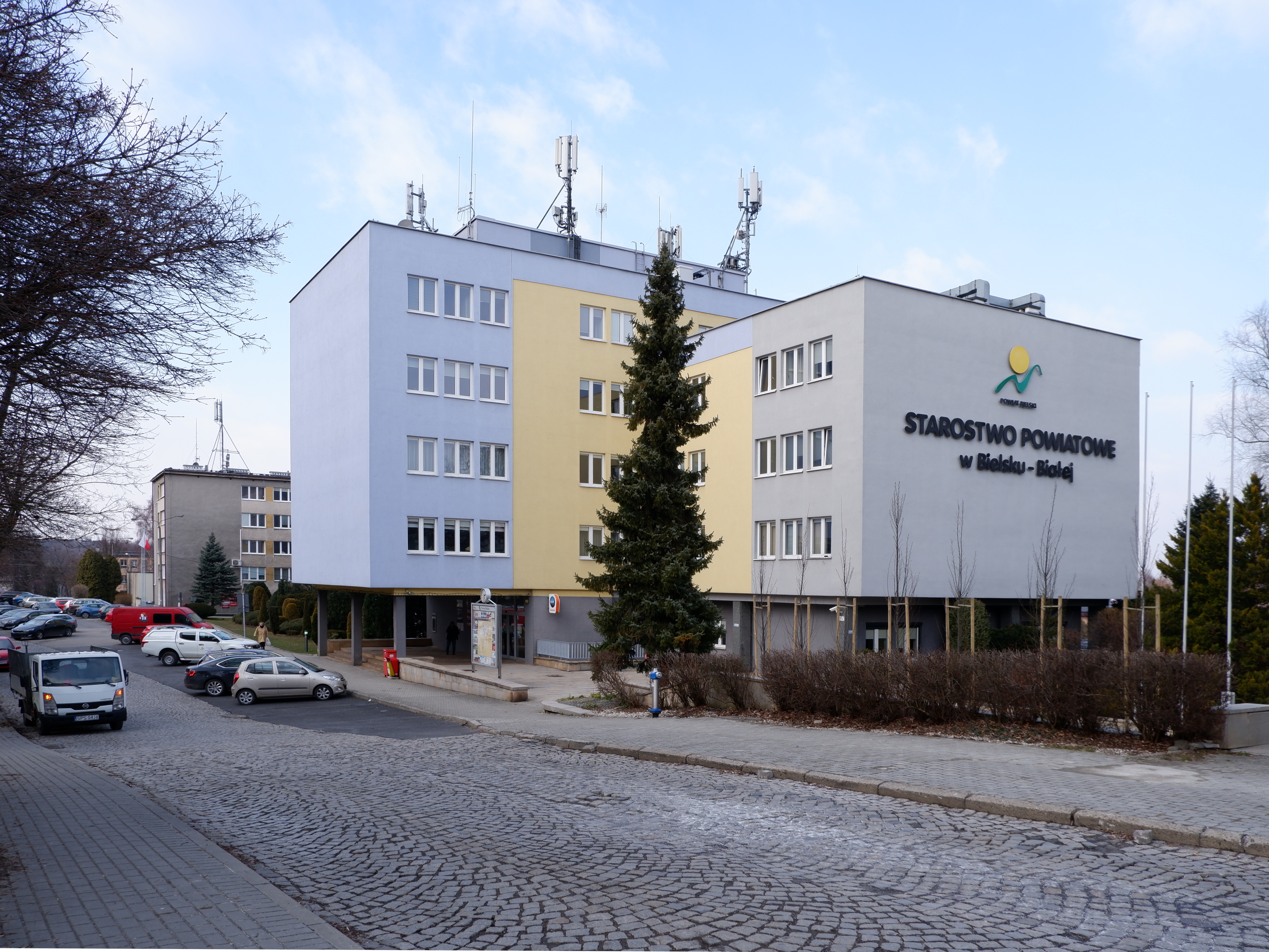 Budynek urzędu wojewódzkiego i starostwa powiatowego w Bielsku-Białej.